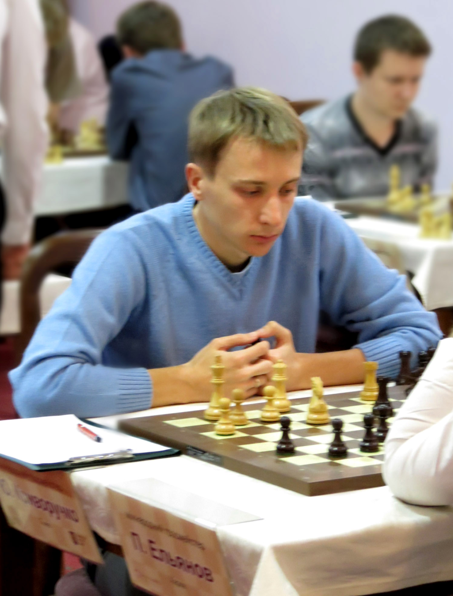 uk: Юрій Криворучко. Чемпіонат України 2014 року.